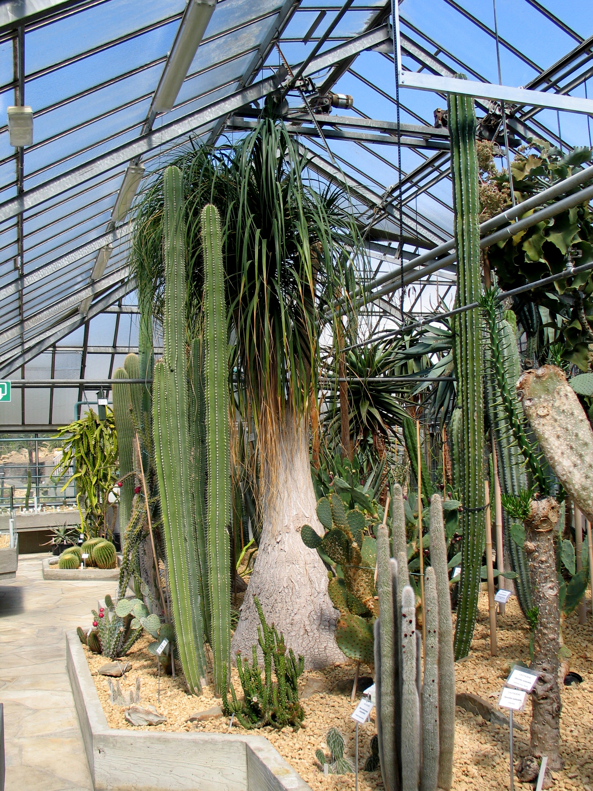 Een kas in de Plantentuin te Gent, België